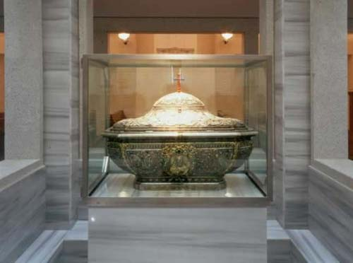 Urna con los restos de San Juan de Mata, en la Parroquia de S. Juan de Mata, en Salamanca